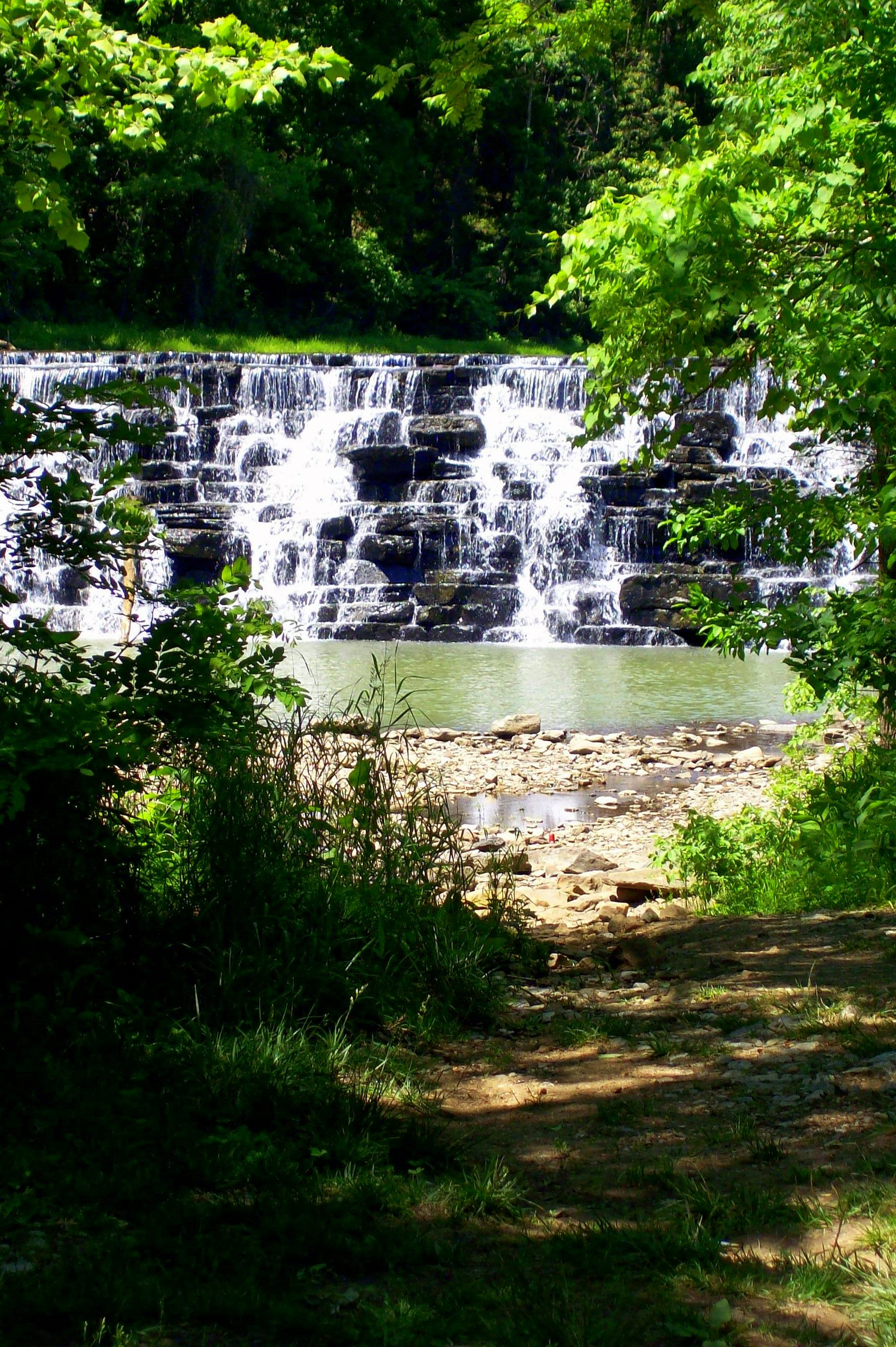 Waterfall in Devil's Den State Park, Arkansas